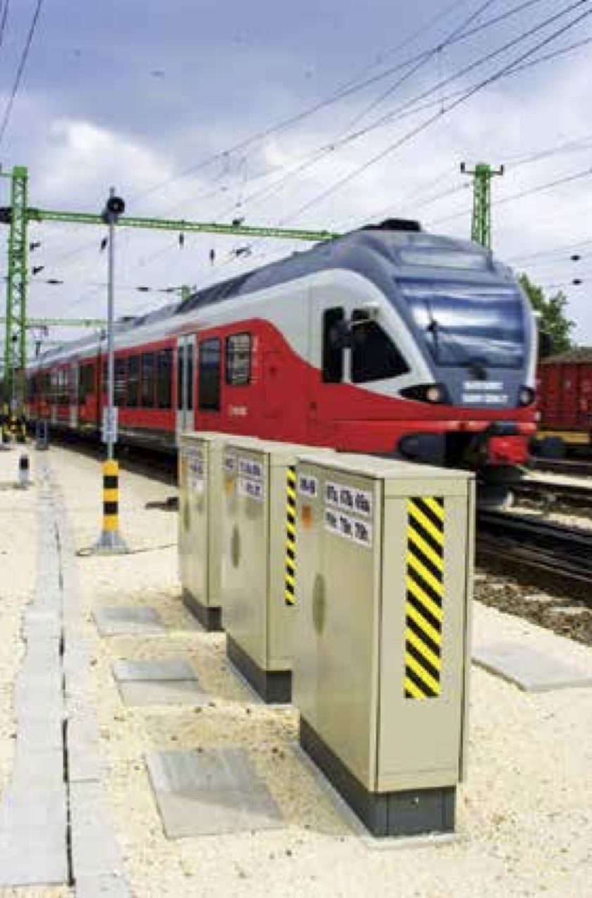 Váltófűtés vezérlő- és kapcsolószek- rények Kelenfőld állomáson